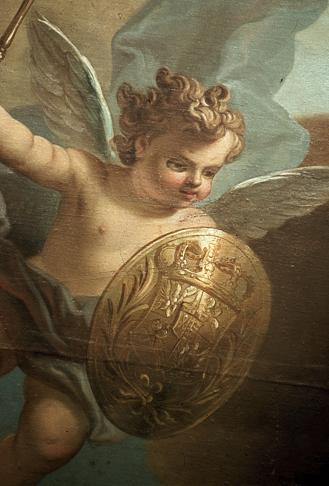 i